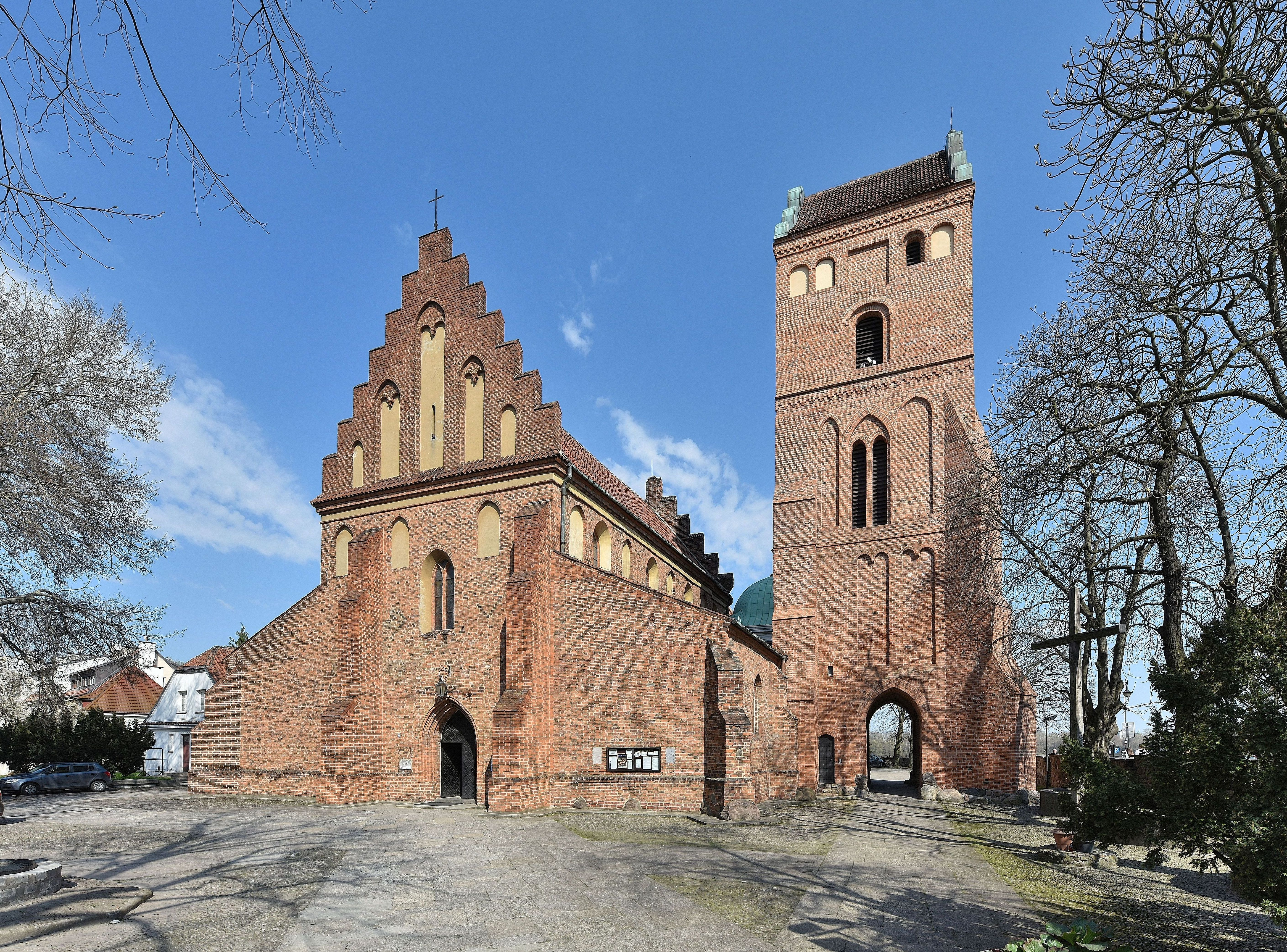 Kościół Nawiedzenia Najświętszej Marii Panny w Warszawie